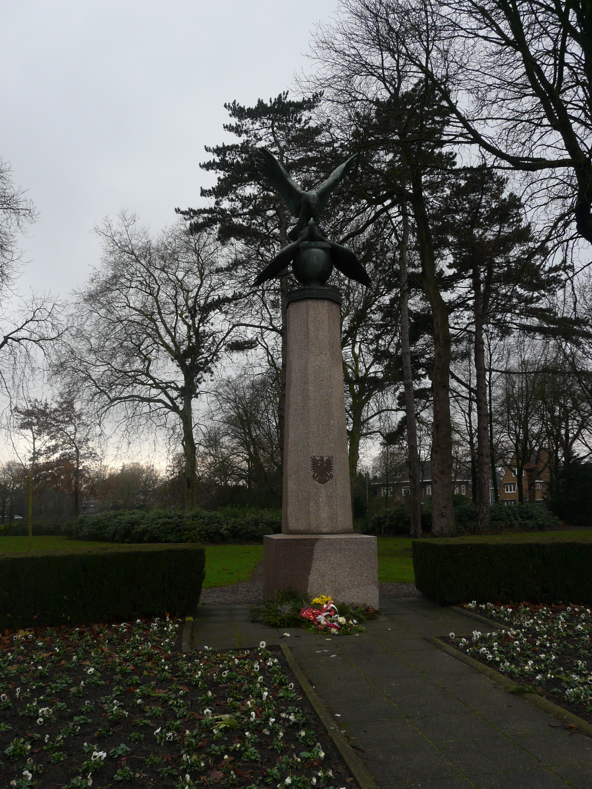 Zicht op het Pools Monument in een deel van het Wilhelminapark in Breda